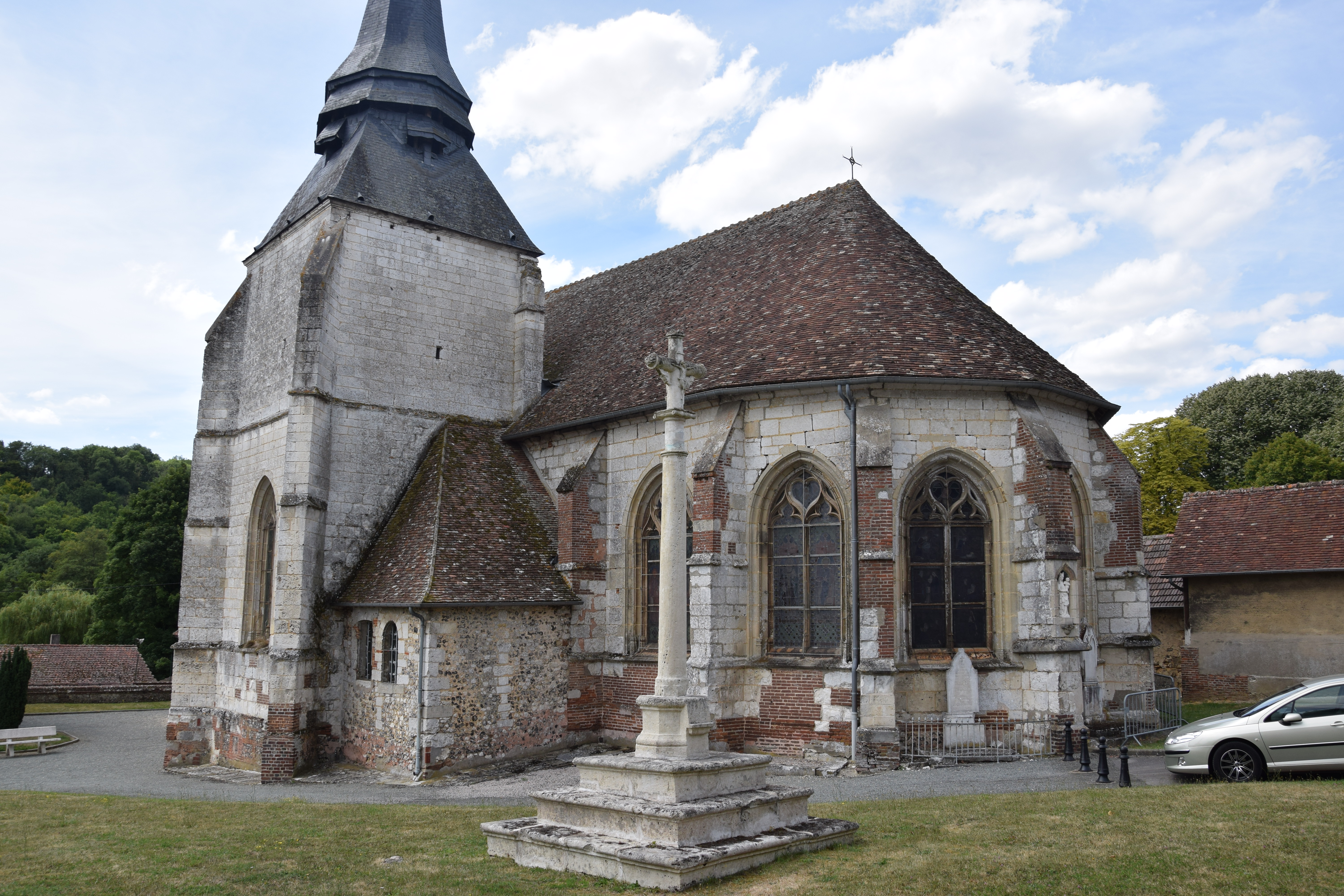 Église Saint-Pierre et Saint-Paul de Talmontiers